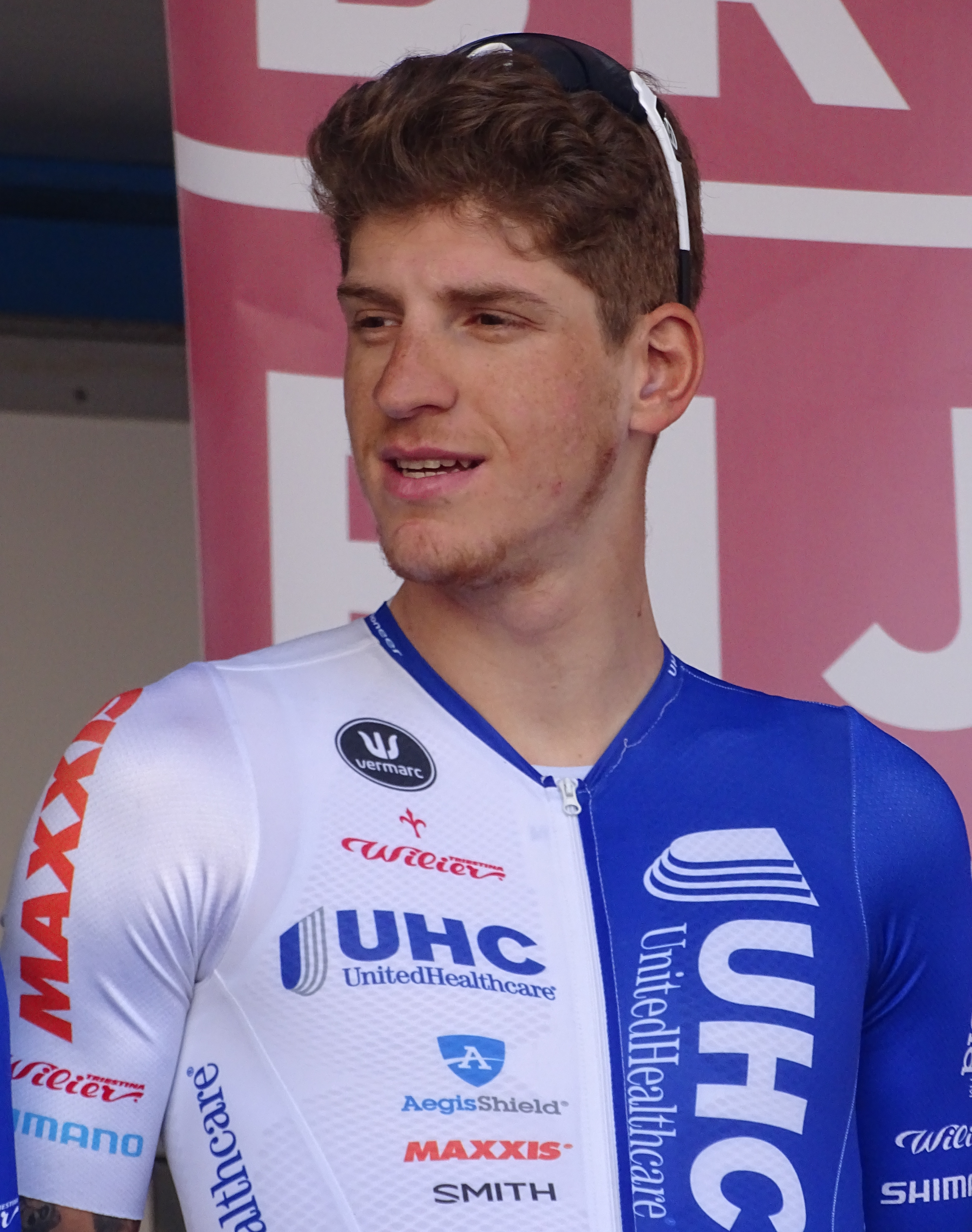 Reportage réalisé le mercredi 15 avril à l'occasion du départ de la Flèche brabançonne 2015 à Louvain, Belgique.